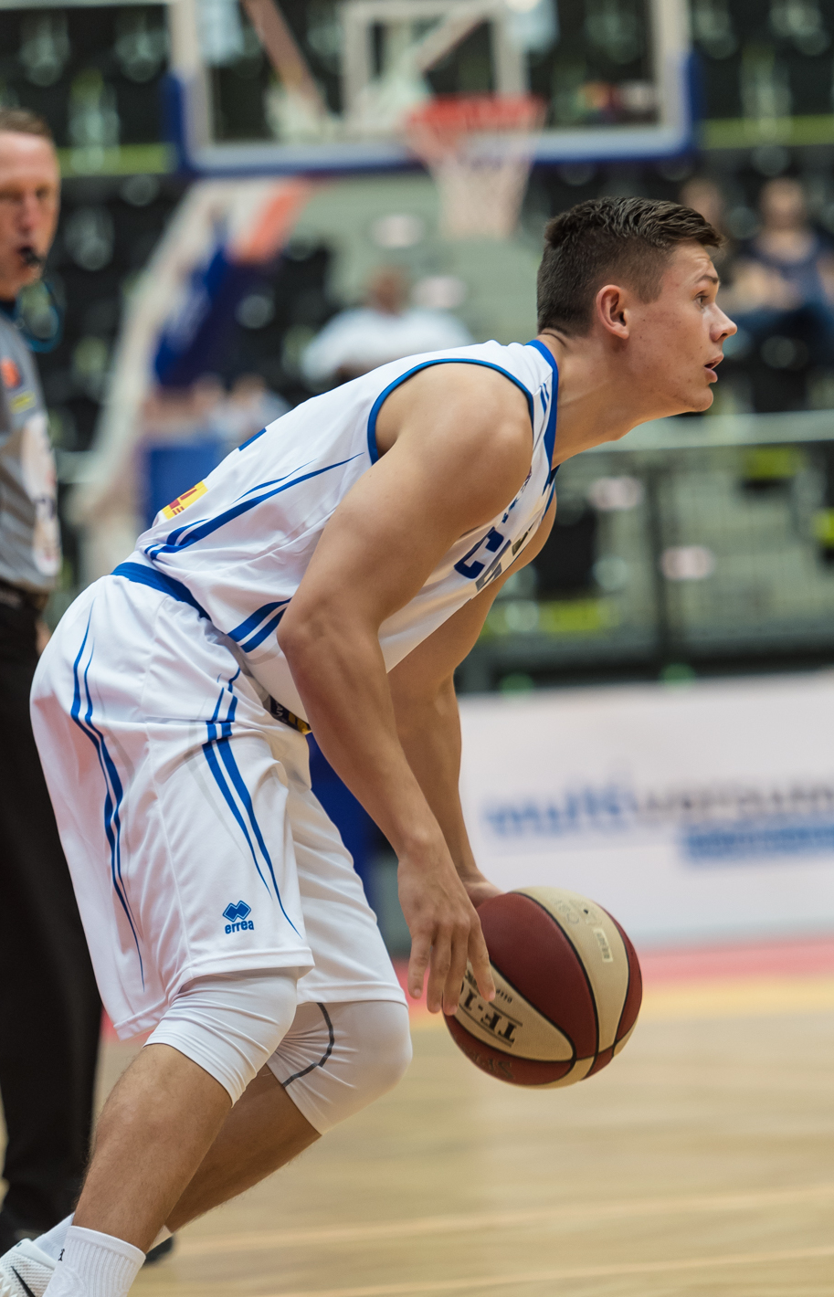 ÖBV Vier-Nationen-Turnier vom 12.-14. August 2016 in Schwechat: Österreich vs Island. Bild zeigt Martin Hermannsson (ISL) und Moritz Lanegger (AUT).